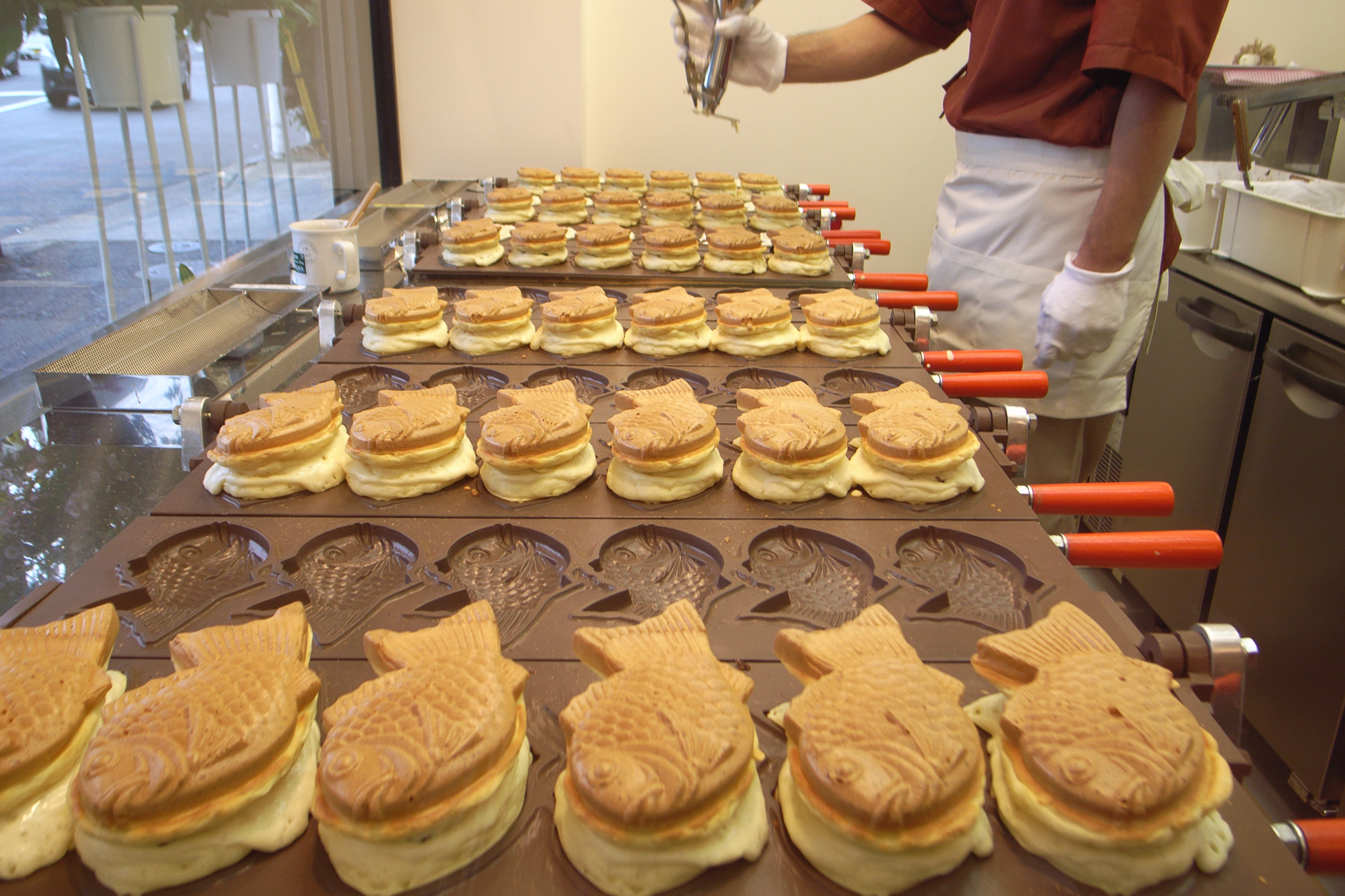 Taiyaki sedang dipanggang. Di artikel Taiyaki - Gambar_Pilihan 8 2008.